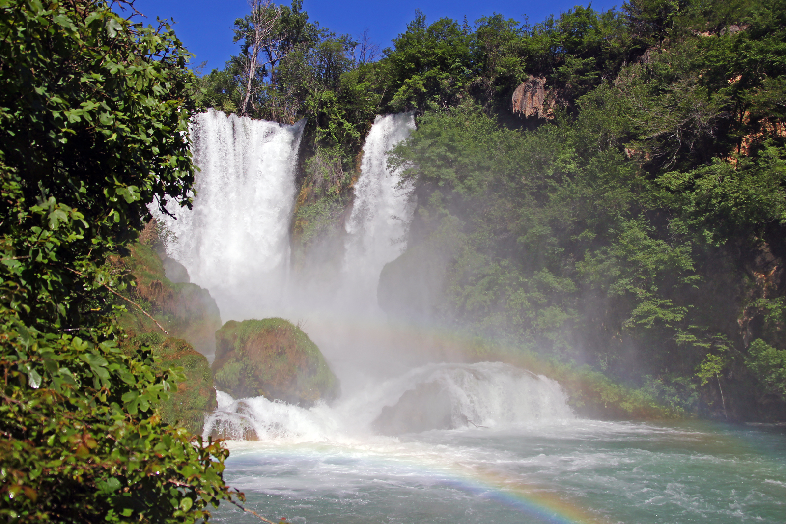 Duga nad Manojlovačkim slapovima